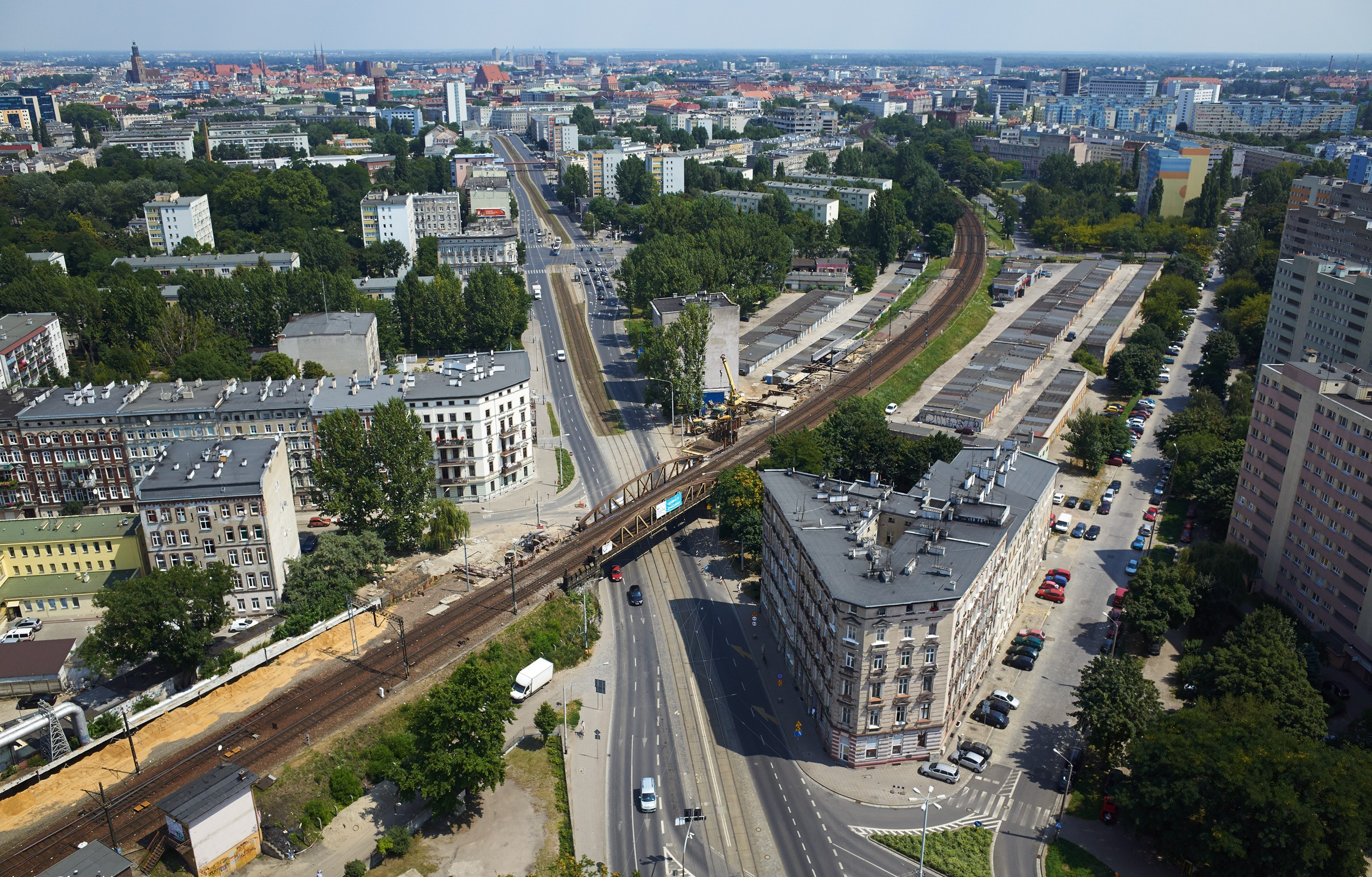 Początek remontu wiaduktu: widoczna ul. Grabiszyńska w kierunku północno-wschodnim (na wprost, przecięta wiaduktem) i jej skrzyżowanie z ul. Lubuską, biegnącą wzdłuż torów w prawo